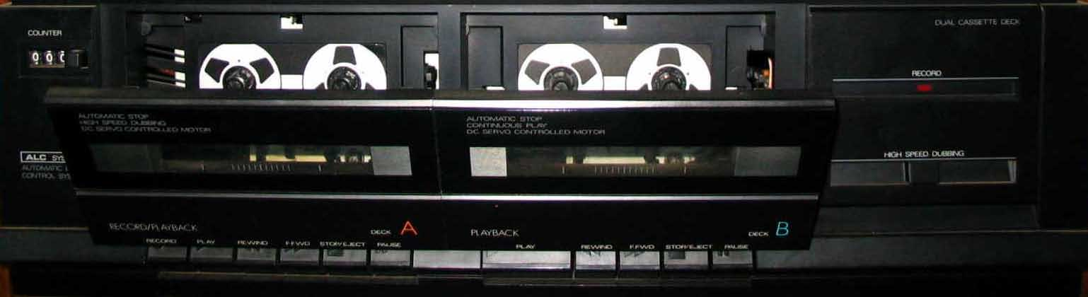 Dualdeck